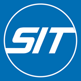 Logo del Sistema Integrado de Transporte de Lima, Perú